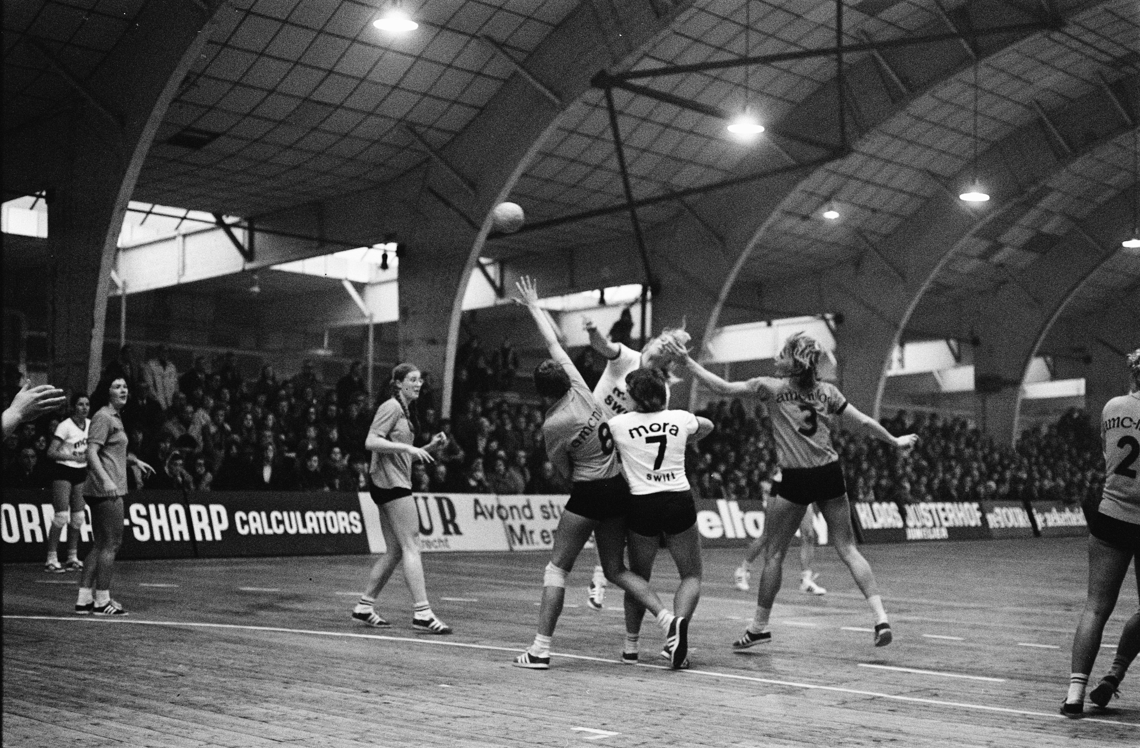 Collectie / Archief : Fotocollectie Anefo Reportage / Serie : [ onbekend ] Beschrijving : AMC Niloc tegen Swift 10-11, zaalhandbal in Oude RAI te Amsterdam ; spelmomenten Datum : 8 december 1974 Locatie : Amsterdam Trefwoorden : handbal, sport Instellingsnaam : Swift Fotograaf : Verhoeff, Bert / Anefo Auteursrechthebbende : Nationaal Archief Materiaalsoort : Negatief (zwart/wit) Nummer archiefinventaris : bekijk toegang 2.24.01.05 Bestanddeelnummer : 927-6316